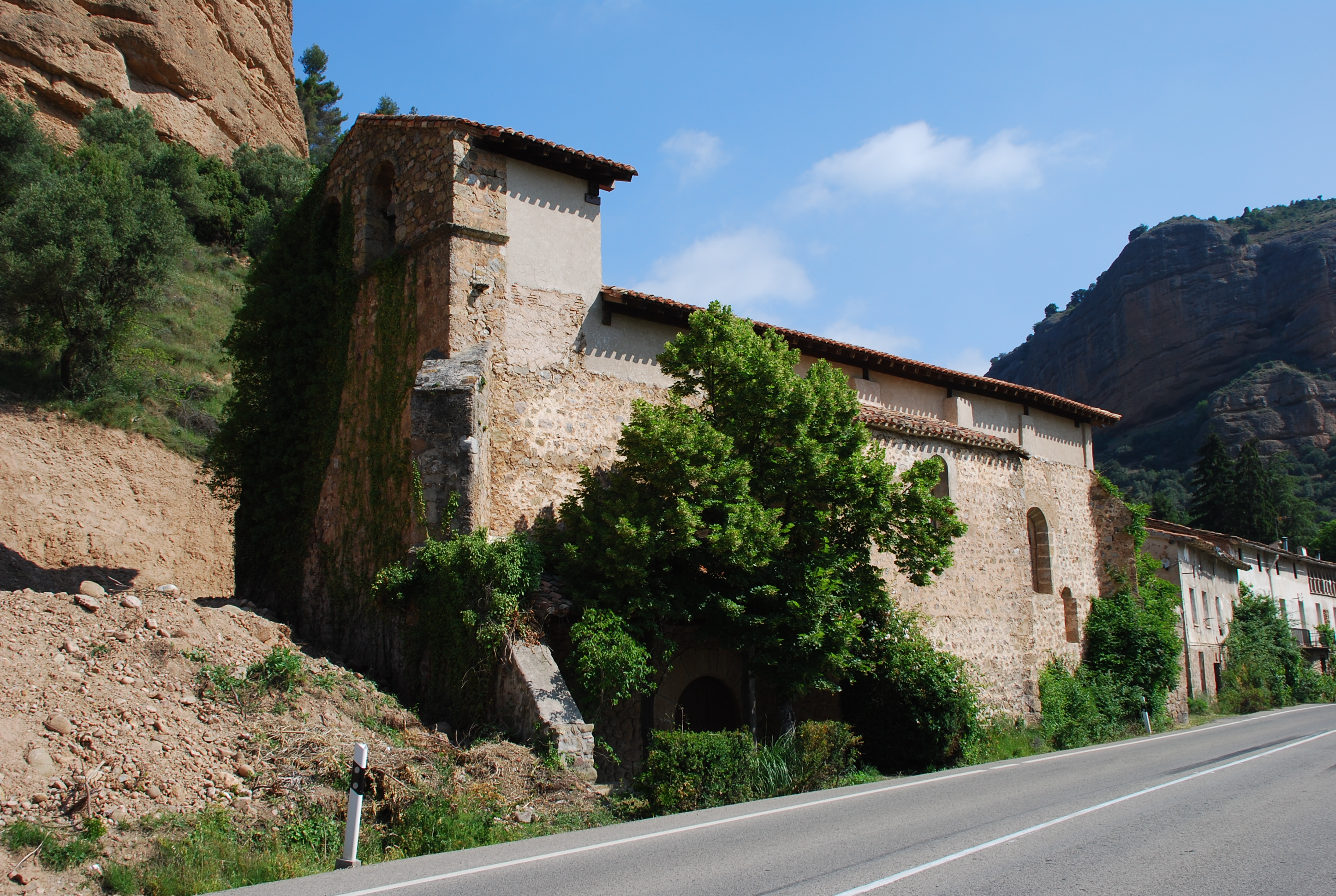 Castañares de las Cuevas - Iglesia de la Asunción. (La Rioja - España)